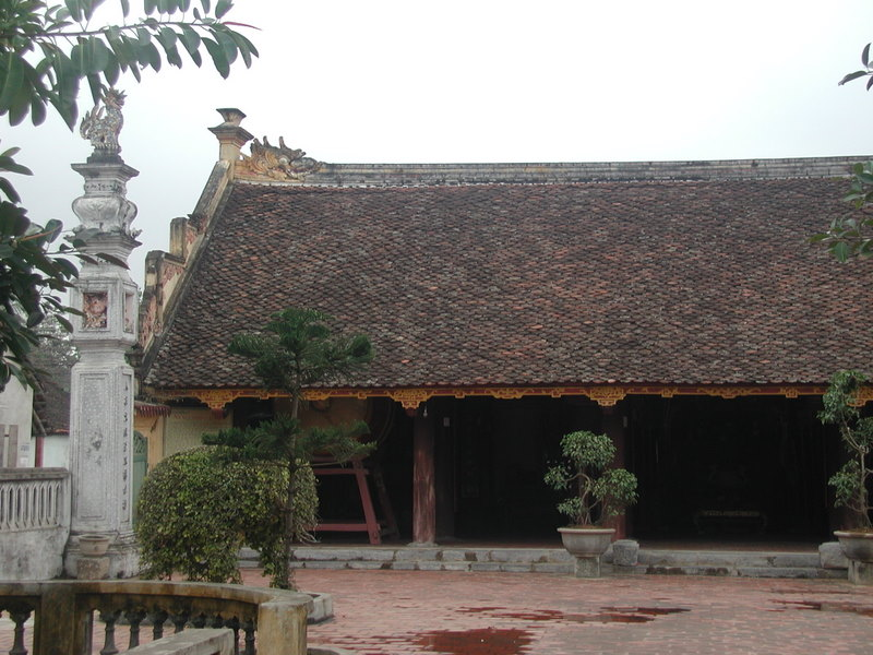 Main Building of Bảng Môn Communal House in Hoằng Lộc, Hoằng Hóa, Thanh Hóa, Việt Nam. Đình Bảng Môn tại xã Hoằng Lộc, huyện Hoằng Hóa, tỉnh Thanh Hóa.